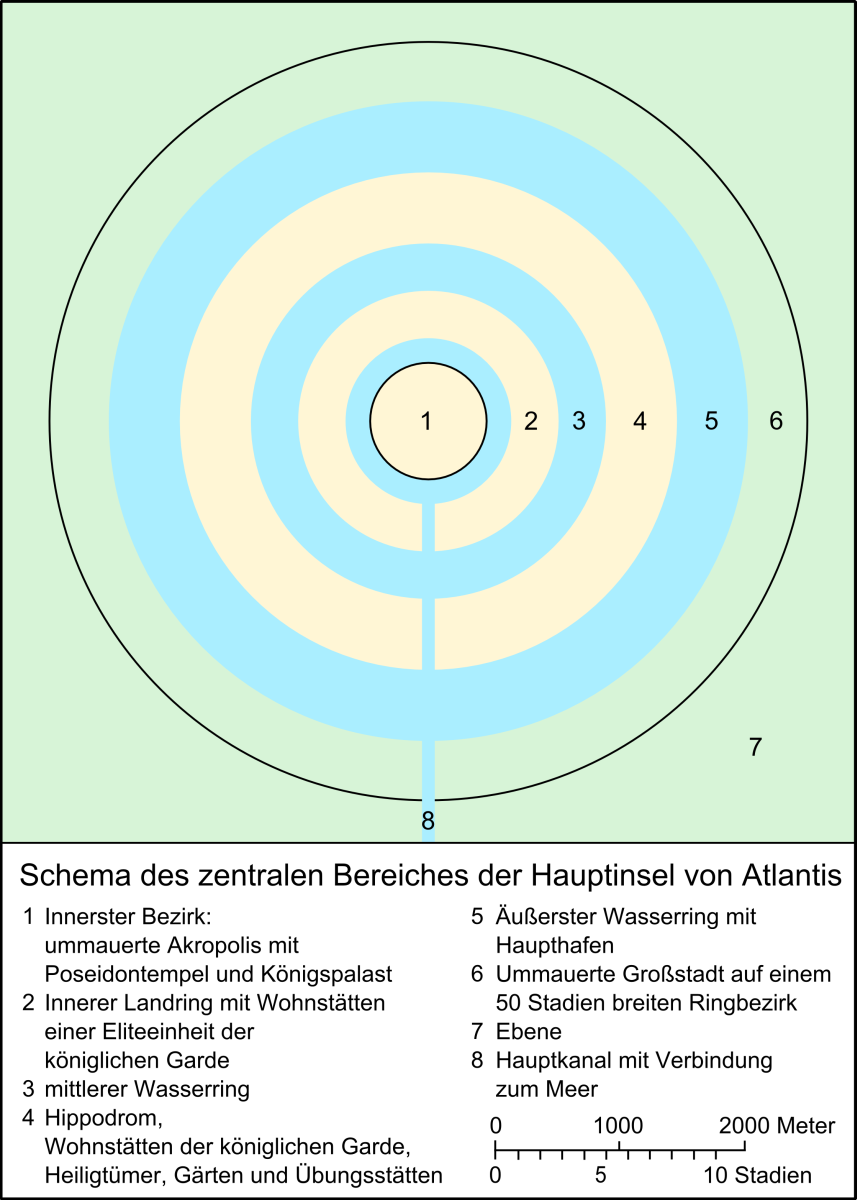 Schematische Darstellung des zentralen Bereiches der Hauptinsel von Atlantis nach der Beschreibung von Platon in der "Kritias"